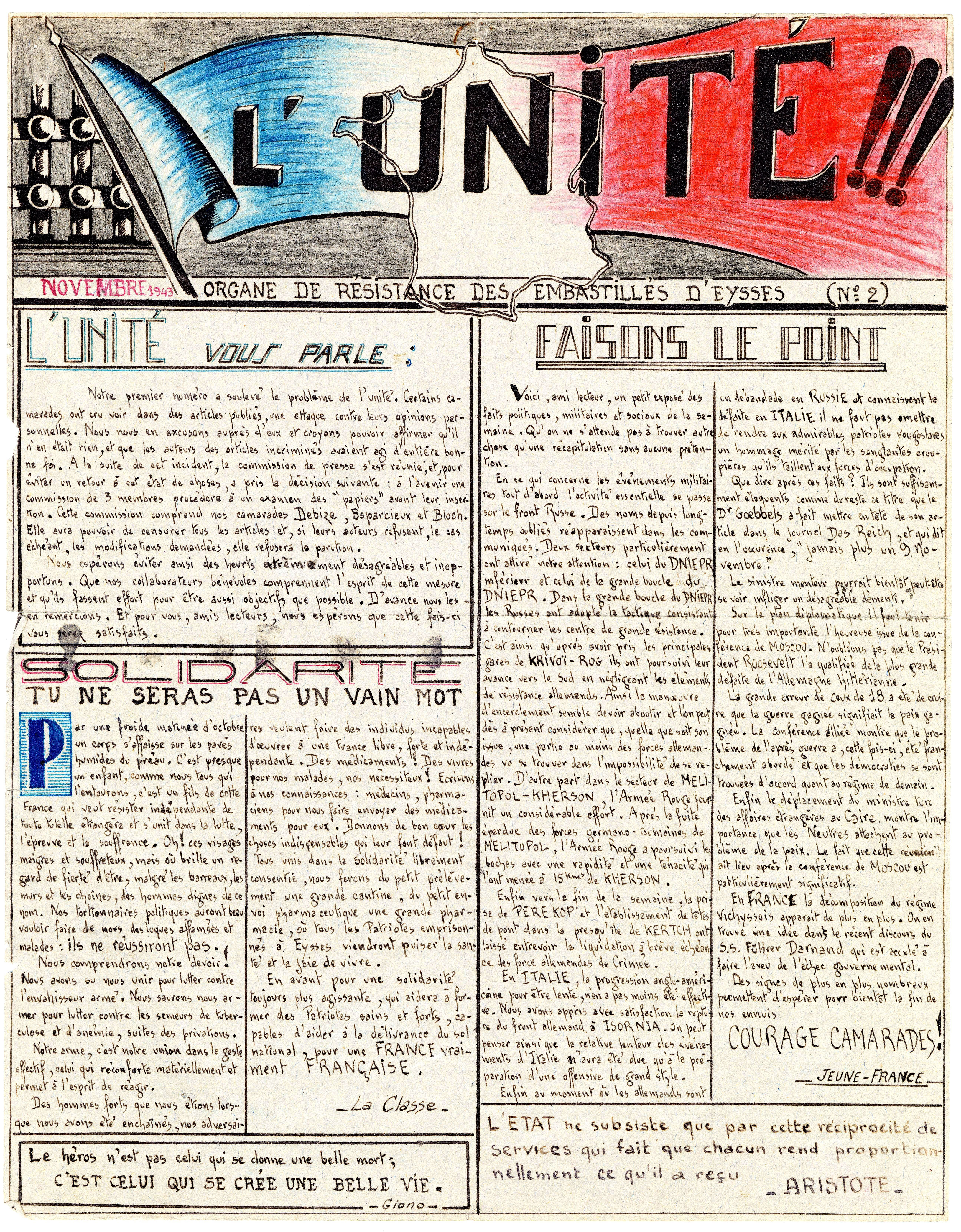 Dès leur arrivée le 15 octobre 1943, les résistants emprisonnés à Eysses s'organisent et s'unissent, comme en témoigne ce premier numéro clandestin de "L'Unité". Les journaux clandestins sont affichés dans les préaux pour pouvoir être lus par tous les détenus.